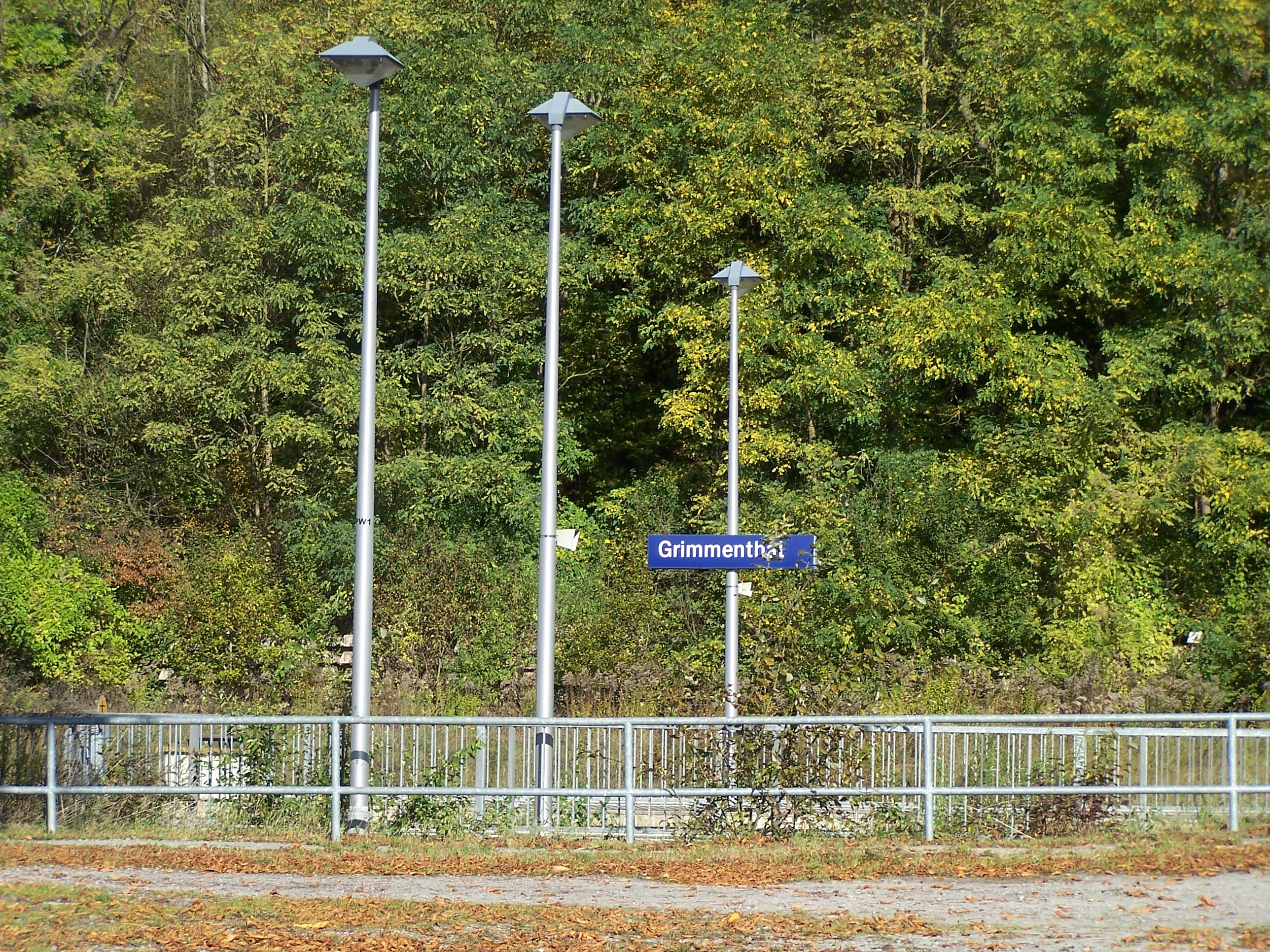 Ansichten und Details zum Bahnknoten Grimmenthal bei Meiningen.